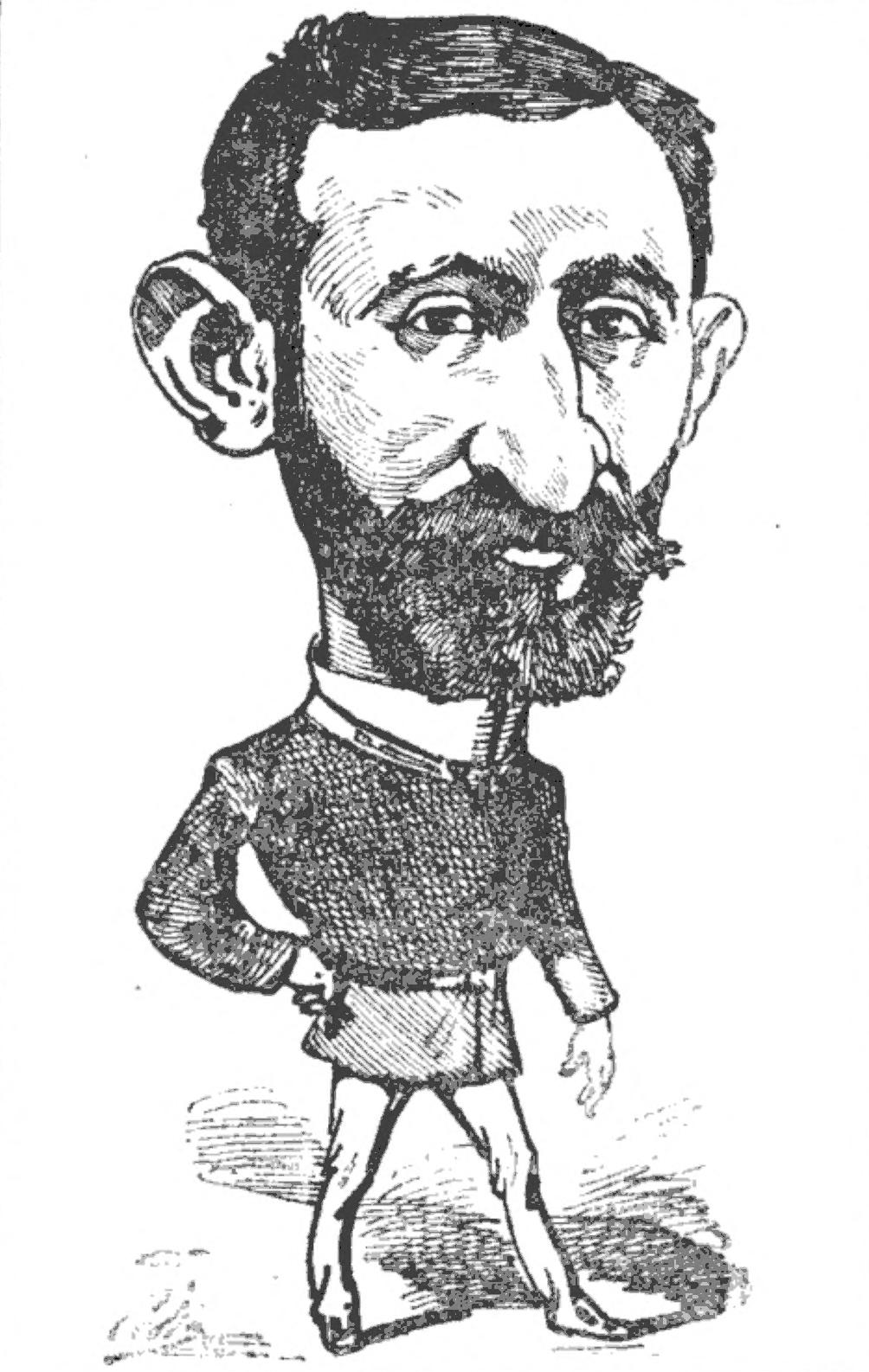 Celestino Lázaro Adradas.